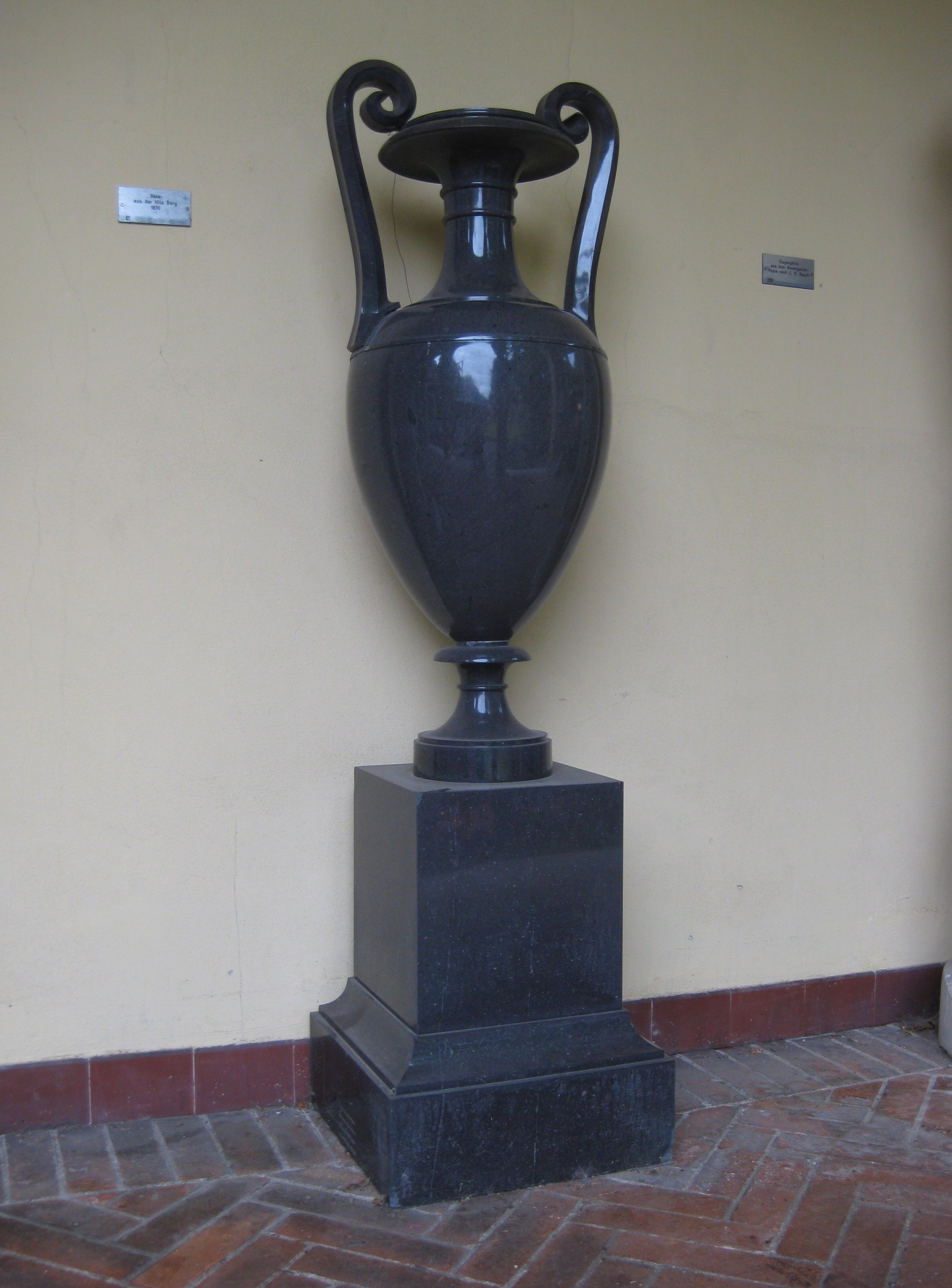 Volutenamphore auf quaderförmigem Sockel, Porphyr (siehe Villa Berg (Kunstwerke)), Vase und Sockel tiefblau, Durchmesser 0,40 m, Höhe der Vase 1,00 m, Sockelhöhe 0,55 m, Entstehungsjahr 1870, ursprünglich: Stuttgart, Villa Berg, Speisesal, heute: Stuttgart, Städtisches Lapidarium, Inventarnummer 61. Ursprünglich wohl im Besitz von Königin Olga. Unten am Sockel bezeichnet: „Колыв[анскаи] Шлиф[овальни] фабрики. / Начата обработкою / 1го Септября 1869 г, окон- / чена 8го Ноября 1870 года“ (Steinschleiferei Kolywan, Arbeitsbeginn 1. September 1869, Ende 8. November 1870).